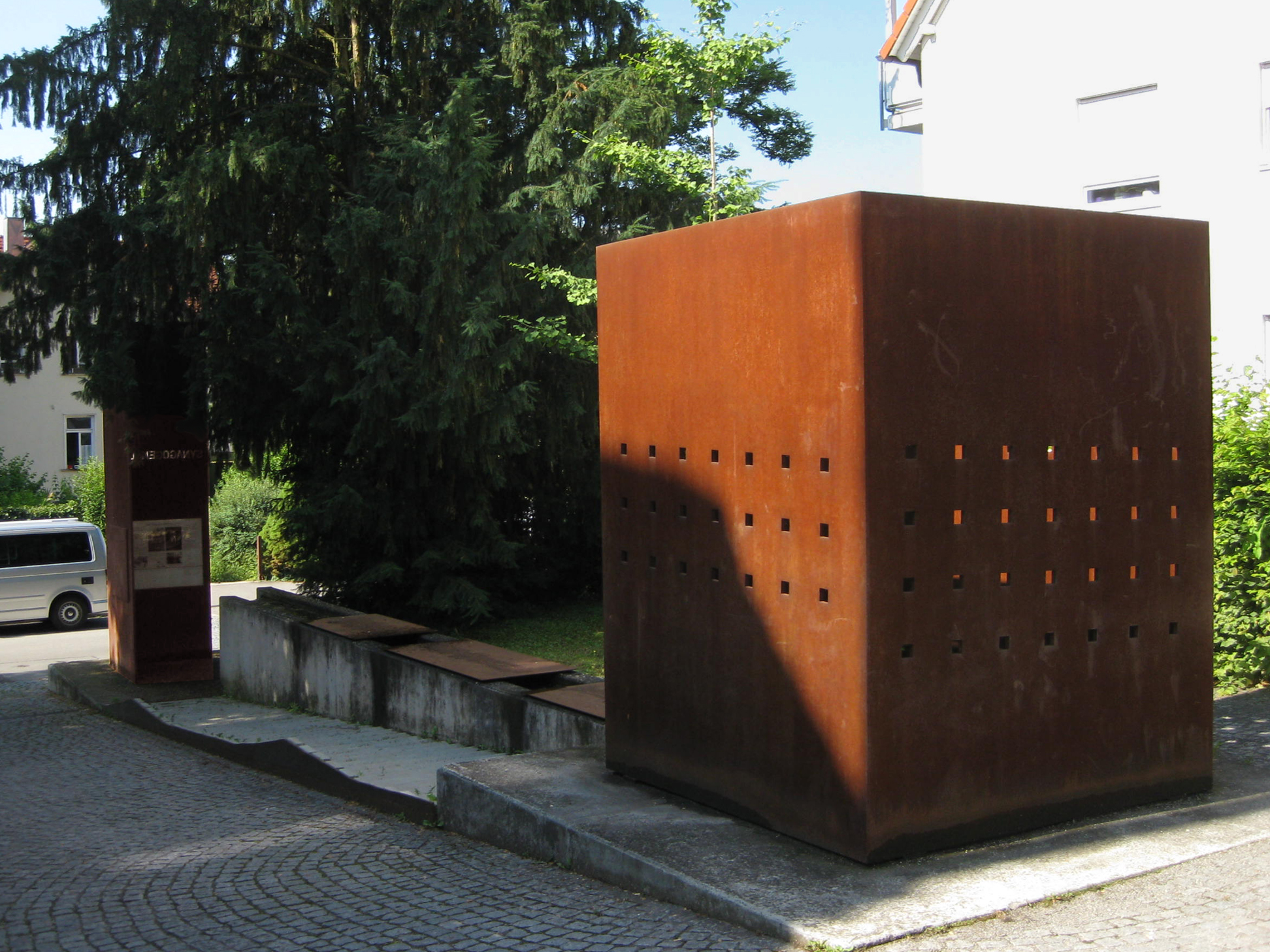 Gert Riel, Mahnmal am Synagogenplatz, Tübingen, Gartenstraße 33 - Gesamtwerk: Kubus in Quaderform, drei Platten mit den Namen der vertriebenen und ermordeten Juden, gekantete Gedenkstele (mit zwei Schrifttafeln auf den Rückseiten)